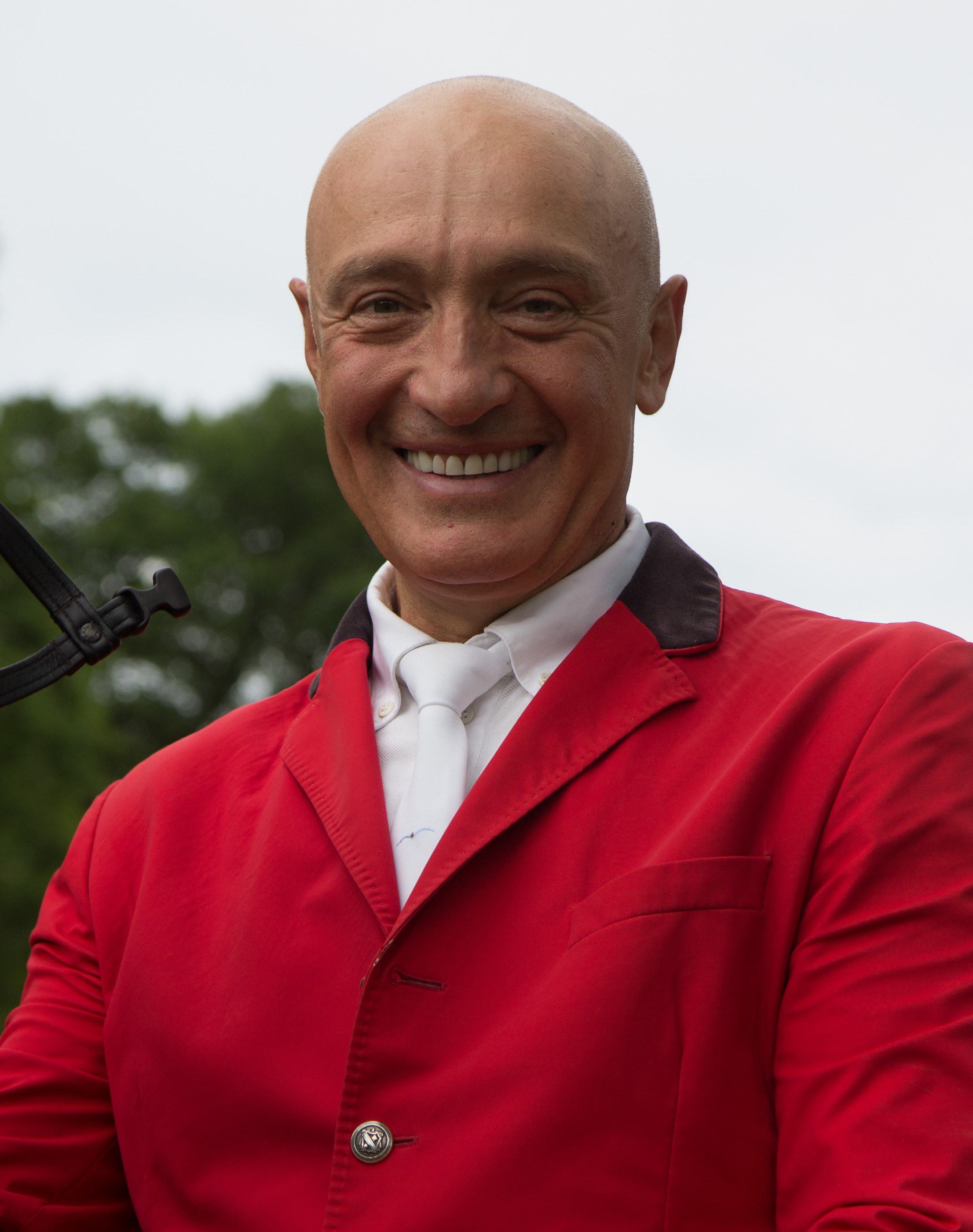 Internationales Wiesbadener Pfingstturnier 2018. CSI 4* Springprüfung KI.S *** m. Stechen (1,50m) "Preis des Hessischen Ministerpräsidenten": Vladimir Tuganov auf Qualidam